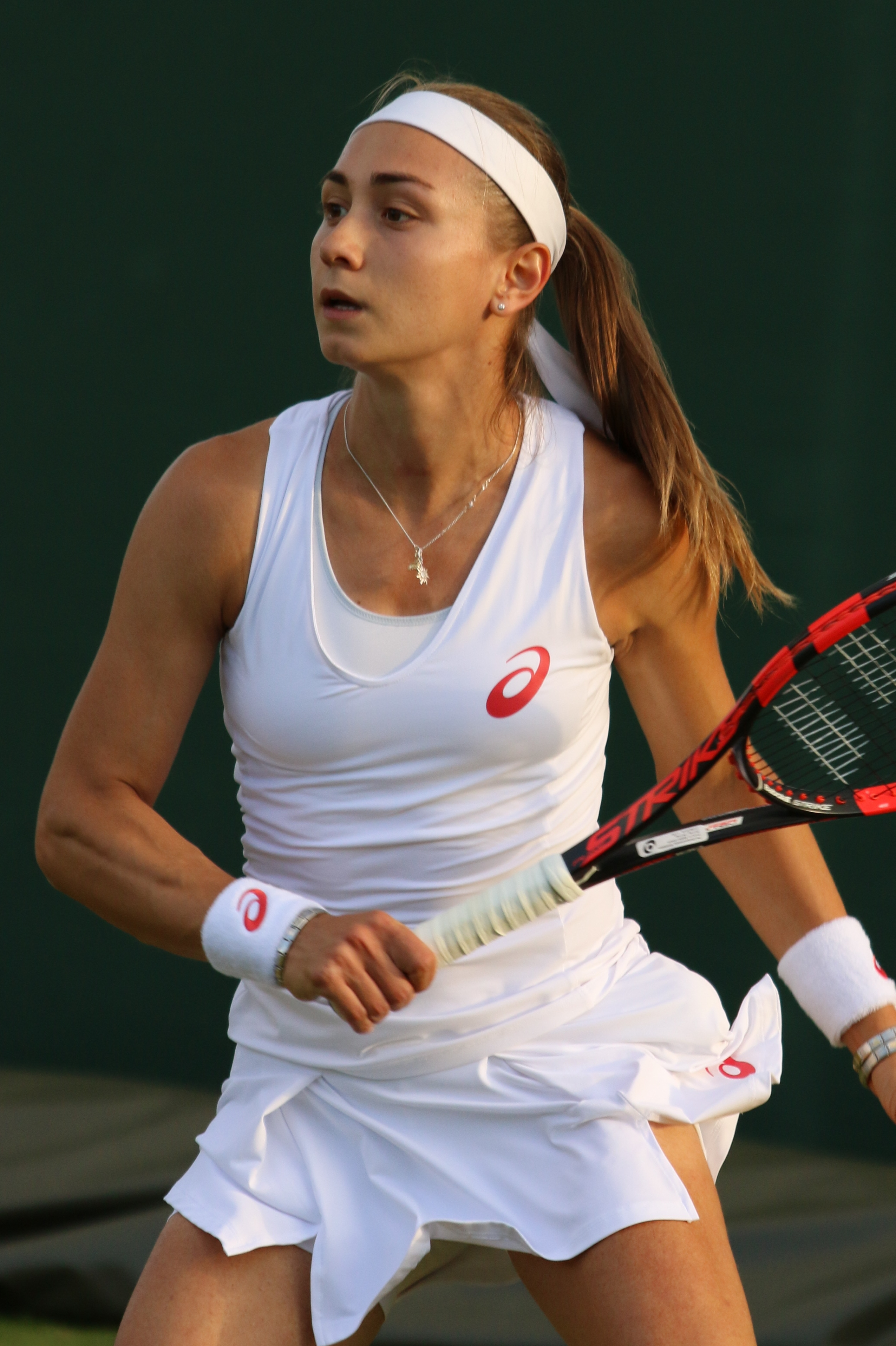 Krunic WMQ16 (13)